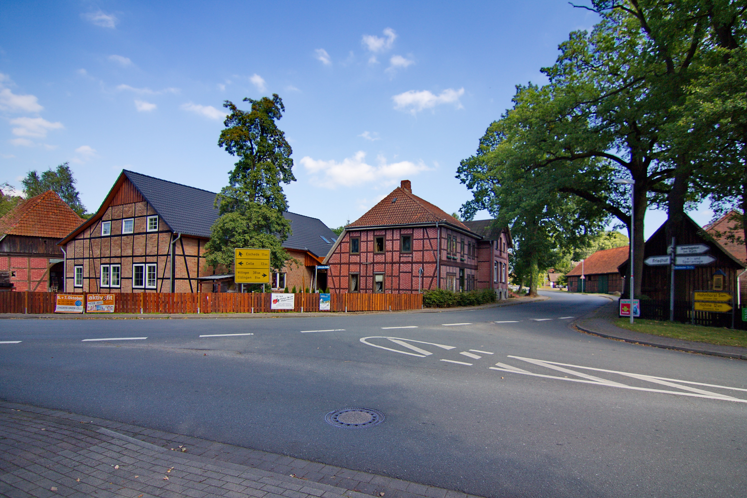 Ortsblick in Beedenbostel, Niedersachsen, Deutschland.